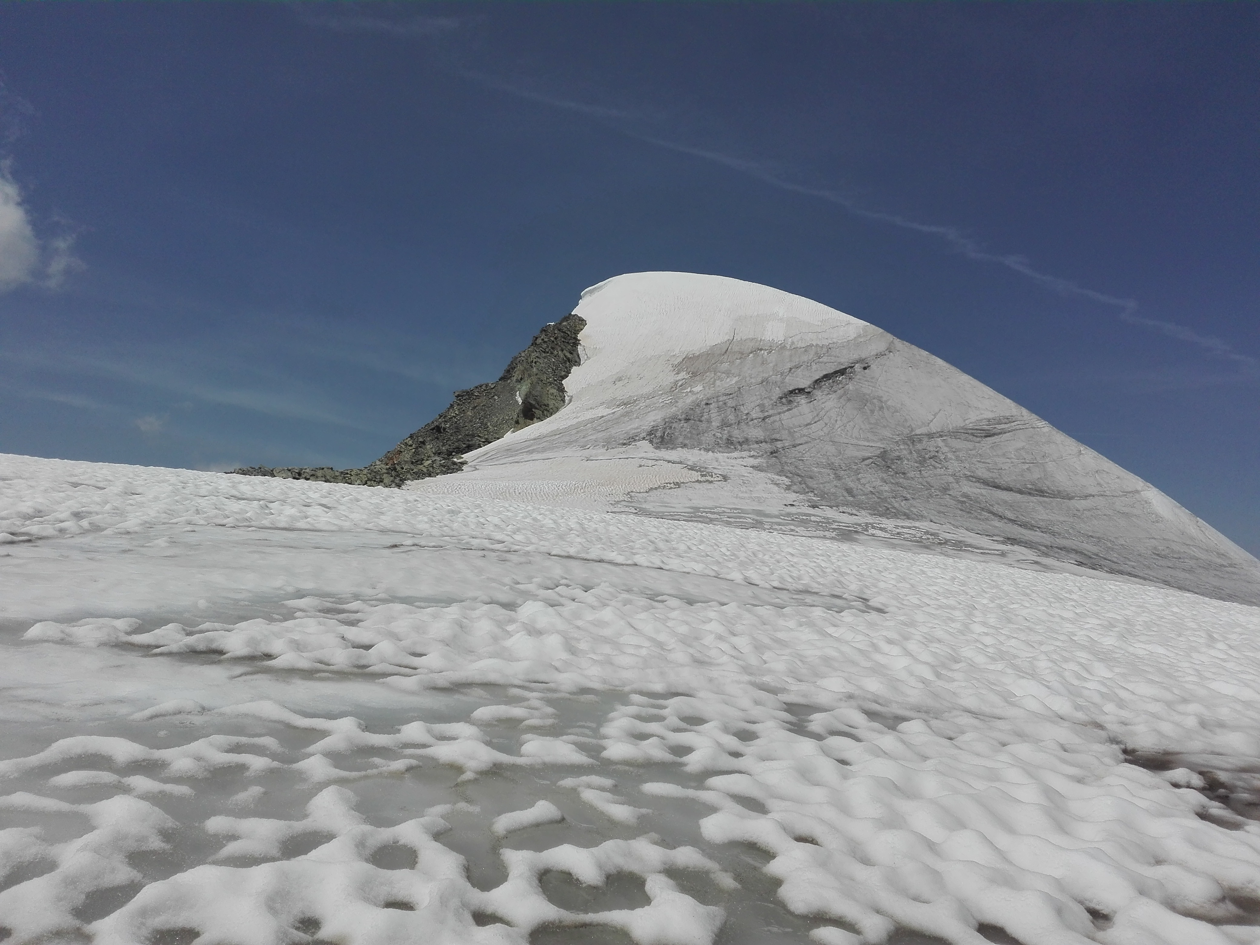 La vetta nevosa della Becca d'Oren orientale